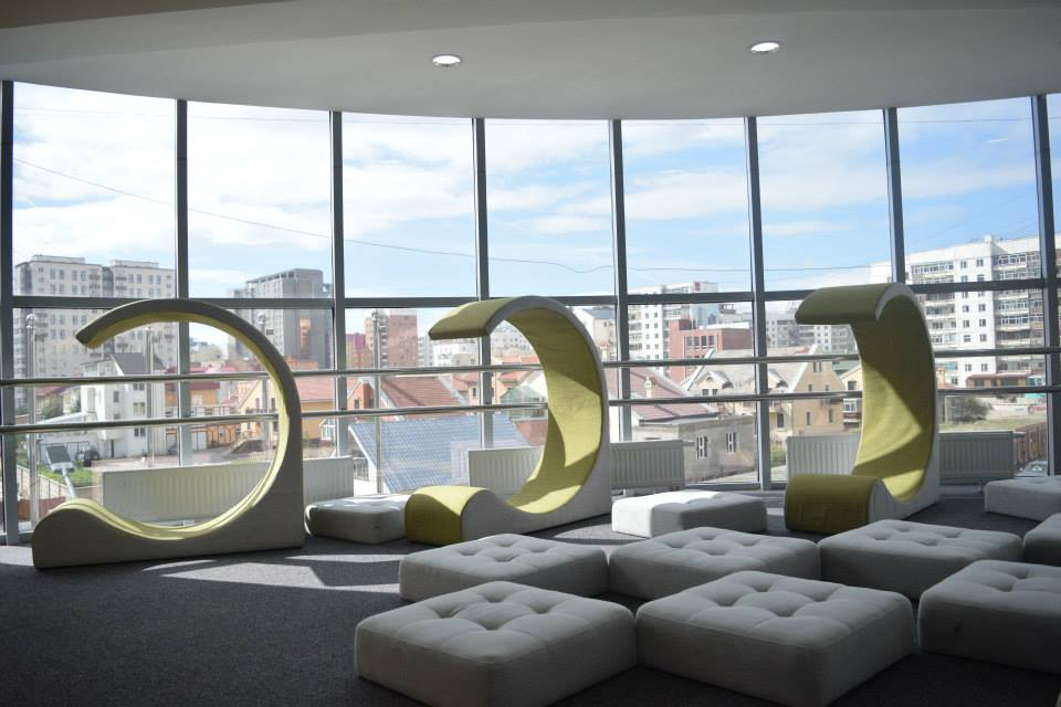 Монгол: Шинэ Монгол сургуулийн сурах орчины талаарх мэдээлэлд хавсралт болгох зорилгоор нийтлэв.